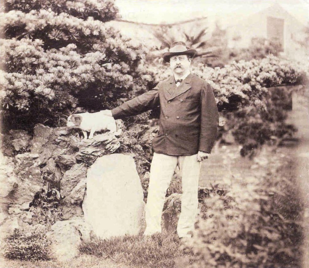 Theodor von Holleben (* 16. September 1838 in Stettin; † 31. Januar 1913 in Berlin) war ein kaiserlich-deutscher Diplomat und Politiker.